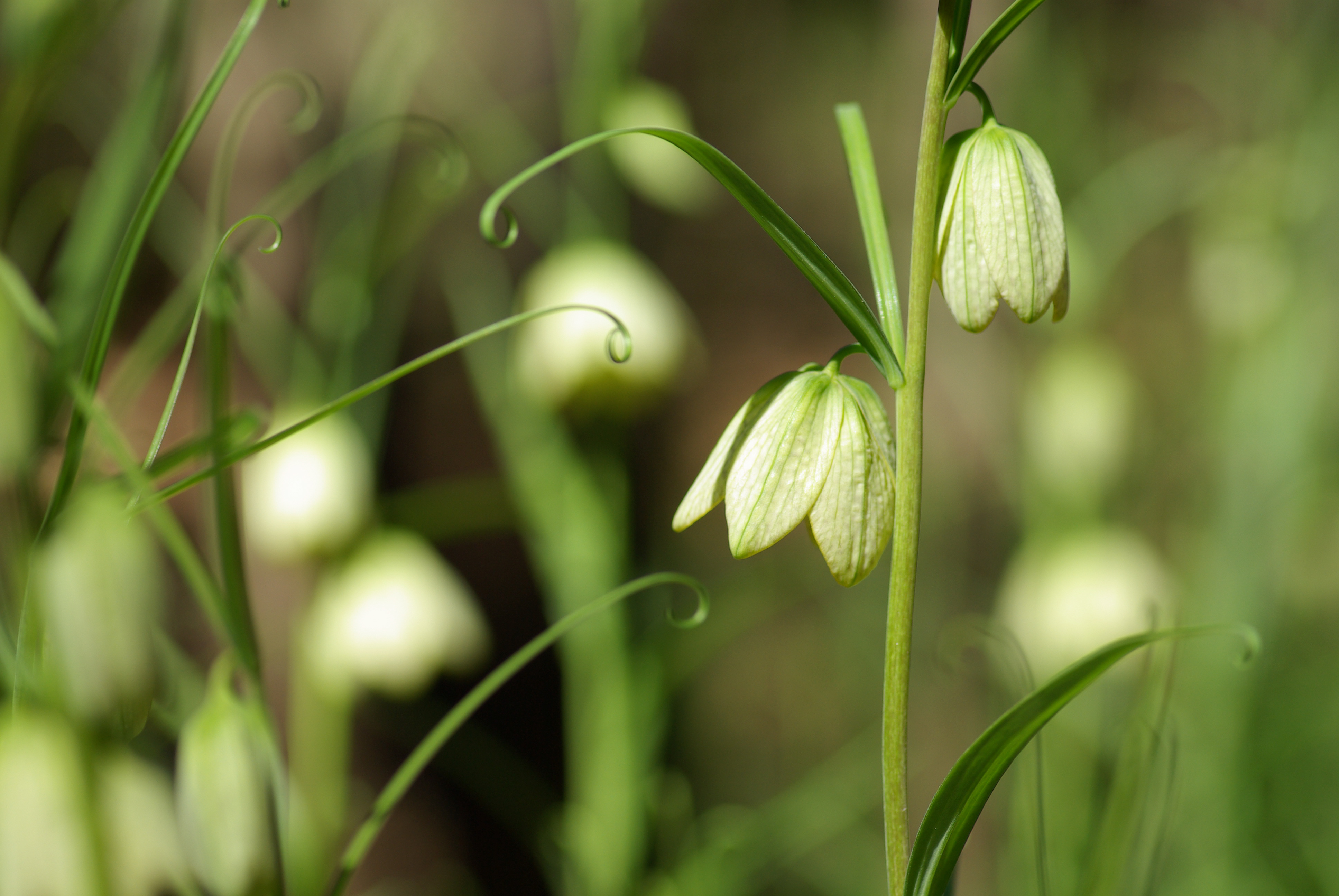 Fritillaria verticillata var. thunbergii